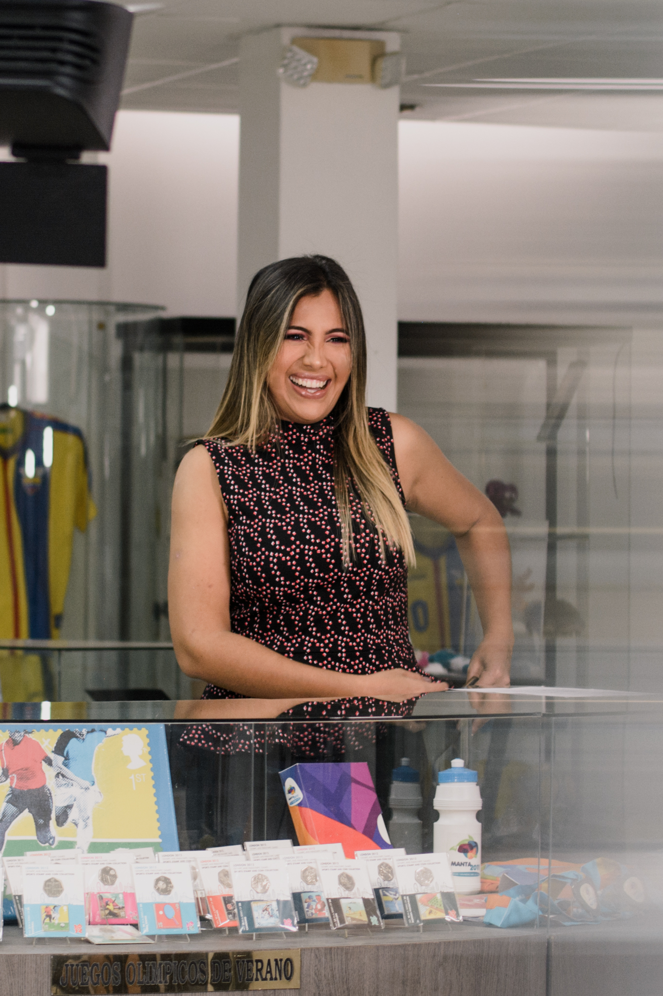 Michelle Medina Prado, comunicadora social y cantante ecuatoriana.